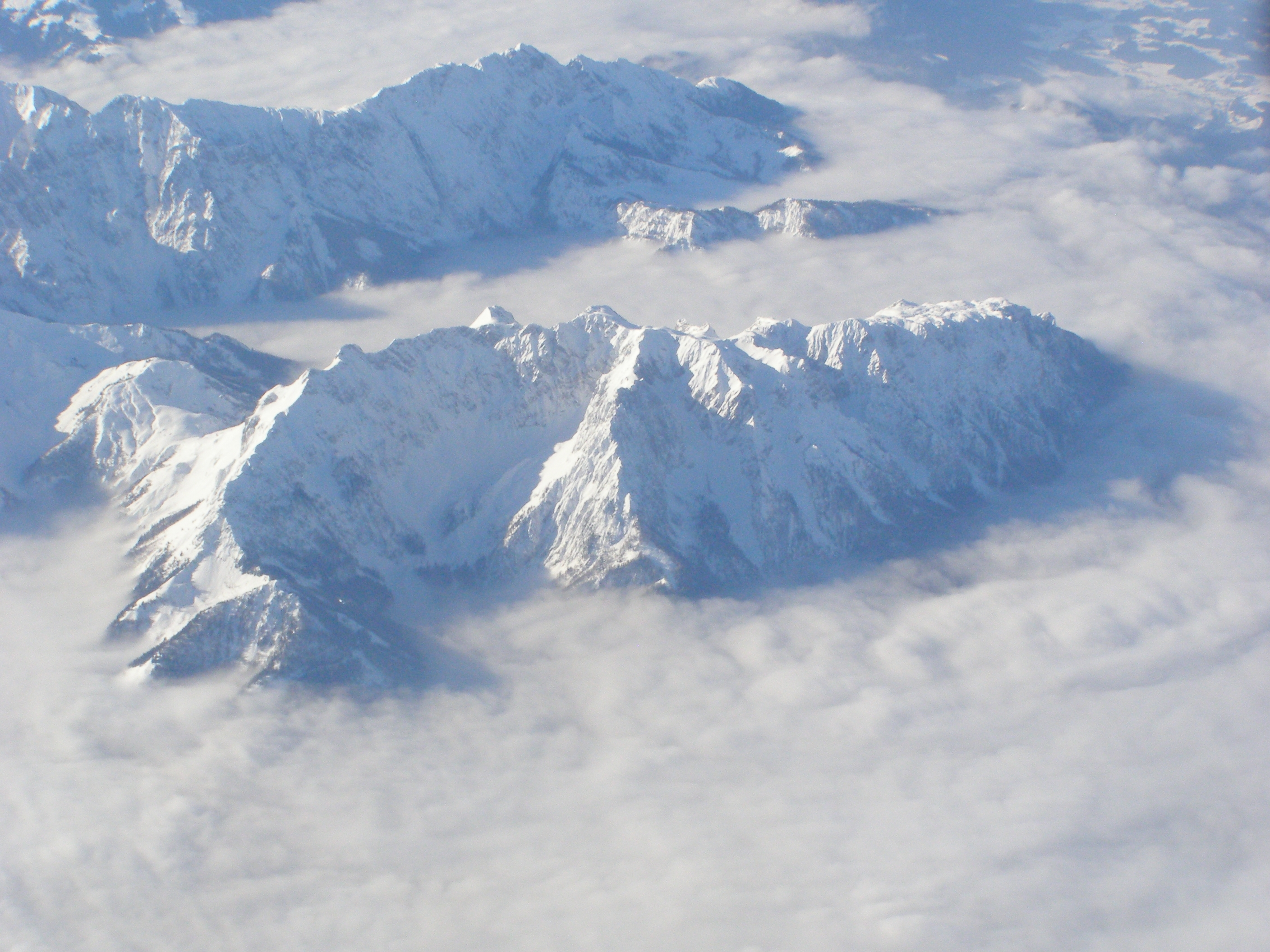 Pyramidenspitze